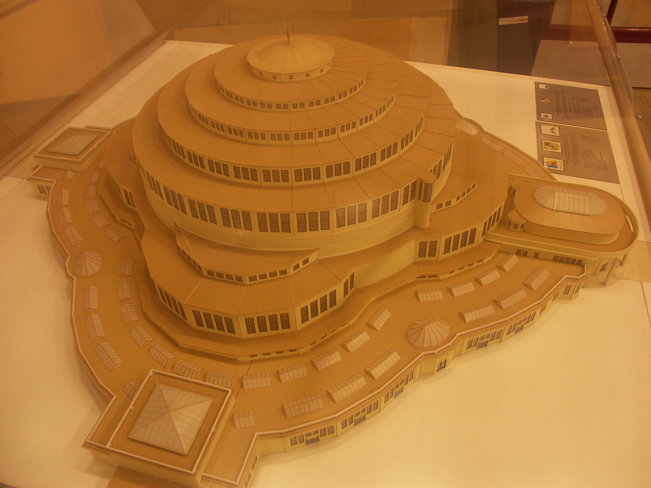 Modell der Jahrhunderthalle in Breslau (ausgestellt in derselbigen)